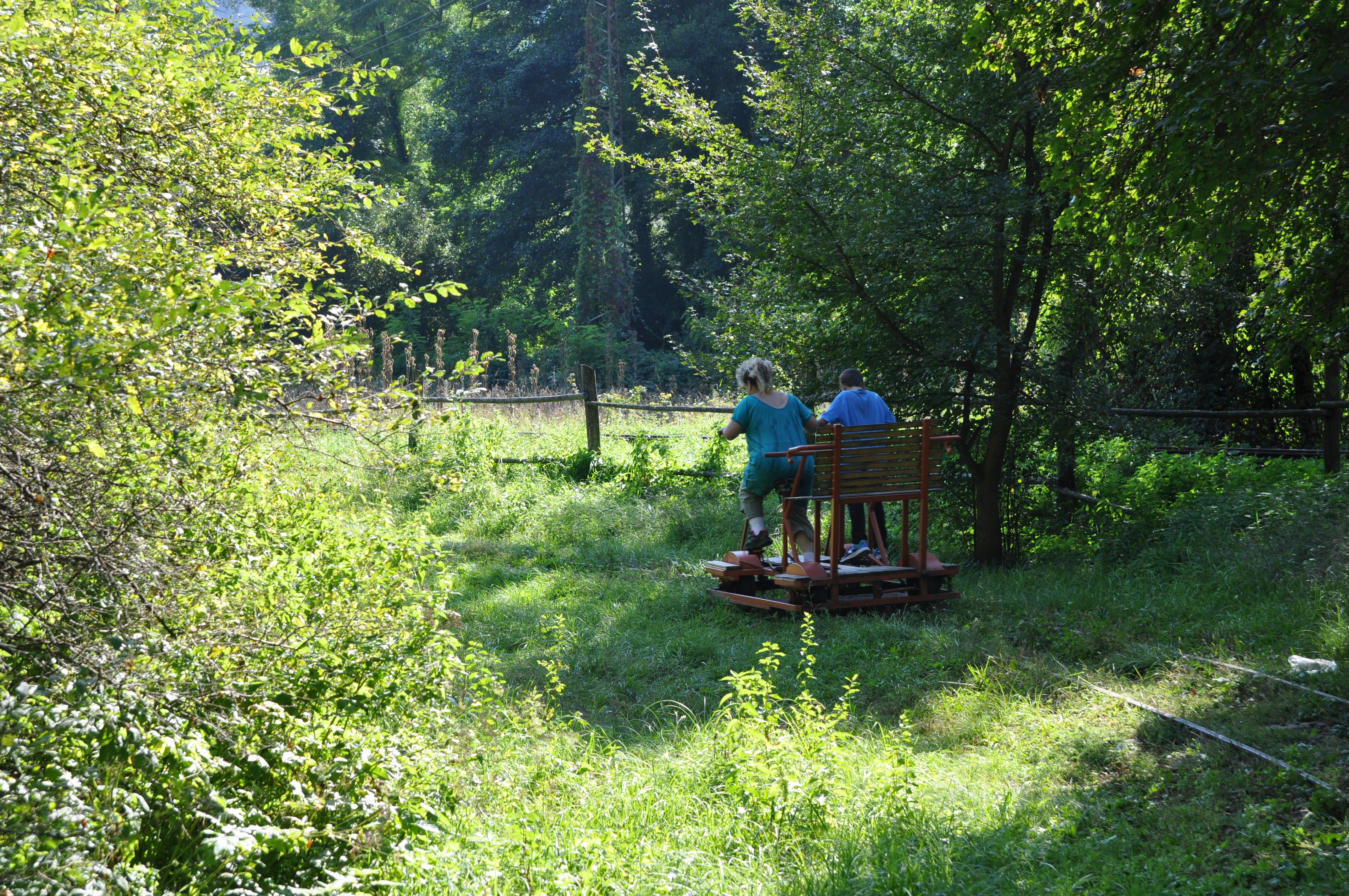 Királyrét, hajtánypálya